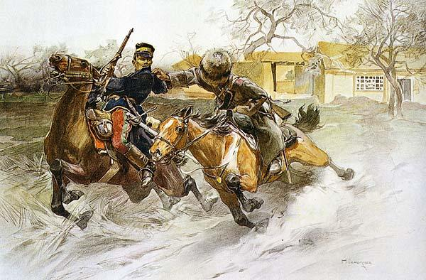 Nikolai Samokish (signature).